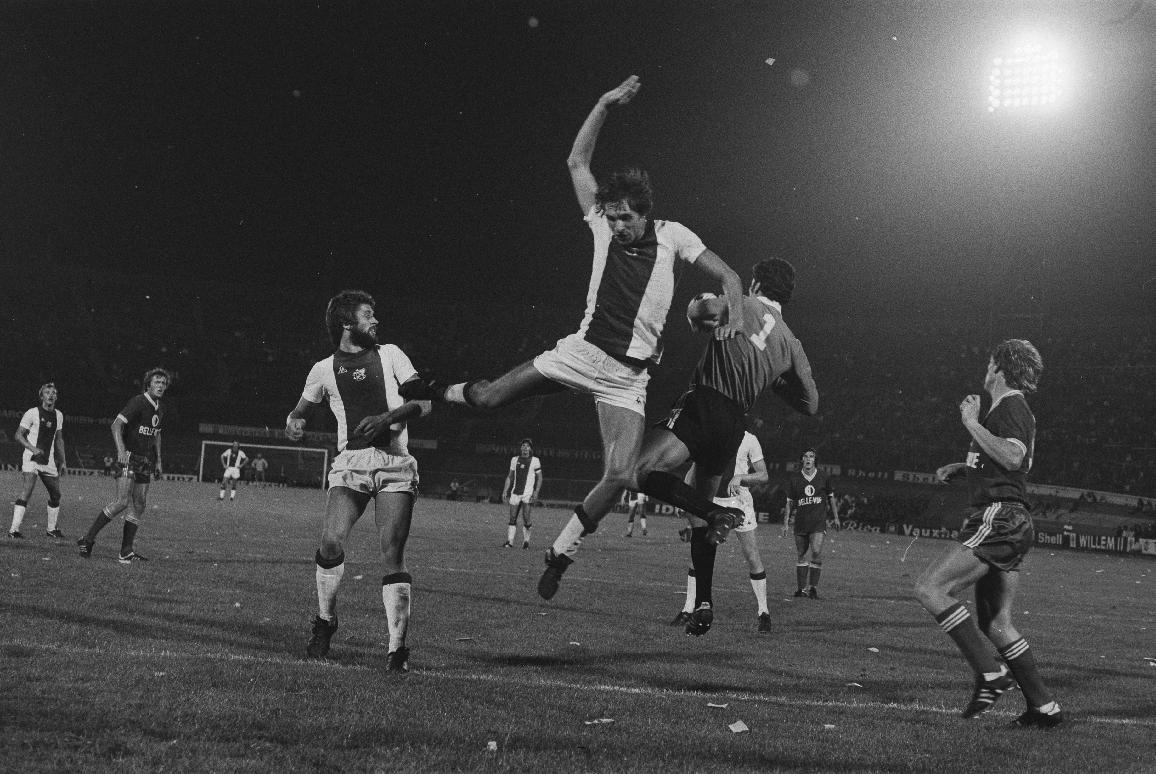 Collectie / Archief : Fotocollectie Anefo Reportage / Serie : [ onbekend ] Beschrijving : Voetbaltoernooi Amsterdam 701, 20, Ajax tegen Anderlecht, Geels rechts, Zuidema links, 21, keeper Ruiter, Erkens (links) en Zuidema (midden) Datum : 8 augustus 1976 Locatie : Amsterdam, Noord-Holland Trefwoorden : sport, voetbal Persoonsnaam : Anderlecht, Zuidema Fotograaf : Verhoeff, Bert / Anefo Auteursrechthebbende : Nationaal Archief Materiaalsoort : Negatief (zwart/wit) Nummer archiefinventaris : bekijk toegang 2.24.01.05 Bestanddeelnummer : 928-7215